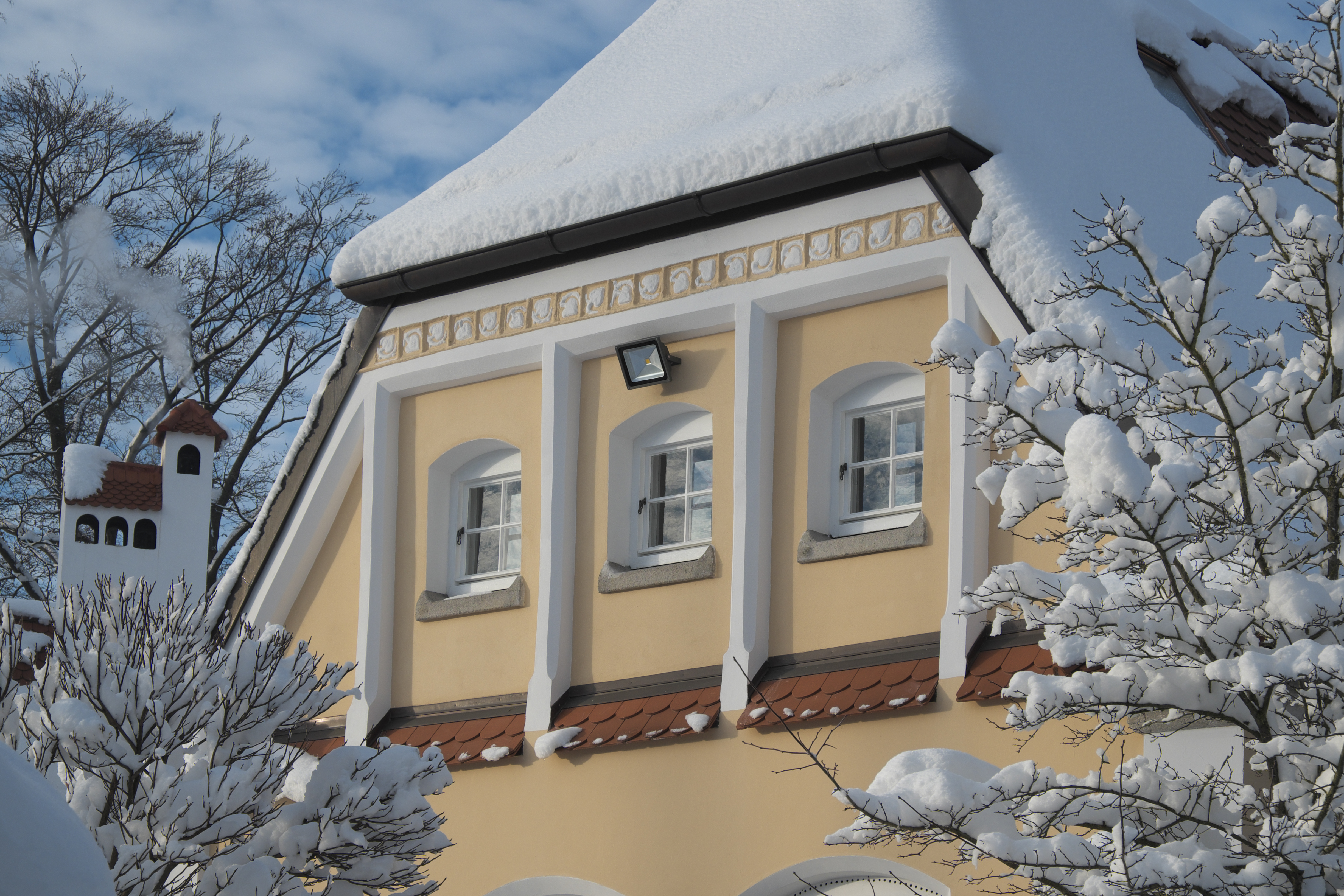 Villa in der Lützowstraße 11 in Pasing im Stadtbezirk Pasing-Obermenzing in München (Bayern/Deutschland), 1896 von Richard Riemerschmid erbaut